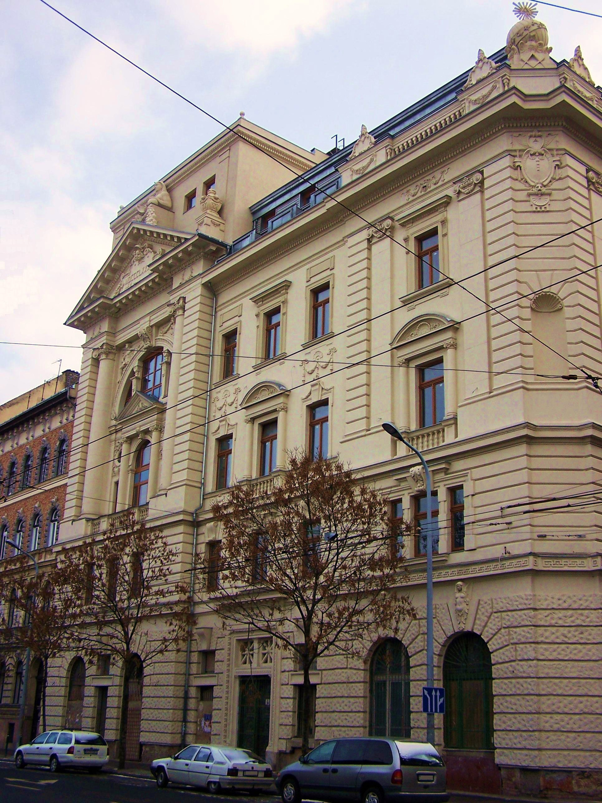 egykori Magyarországi Symbolikus Nagypáholy (Budapest 6, Podmaniczky Frigyes utca 45.) This is a photo of a monument in Hungary. Identifier: 766